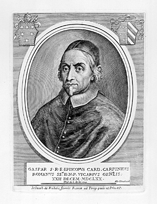 Cardinal Gaspare Carpegna (1625-1714)Incisione. Roma, Italia, Palazzo Braschi.